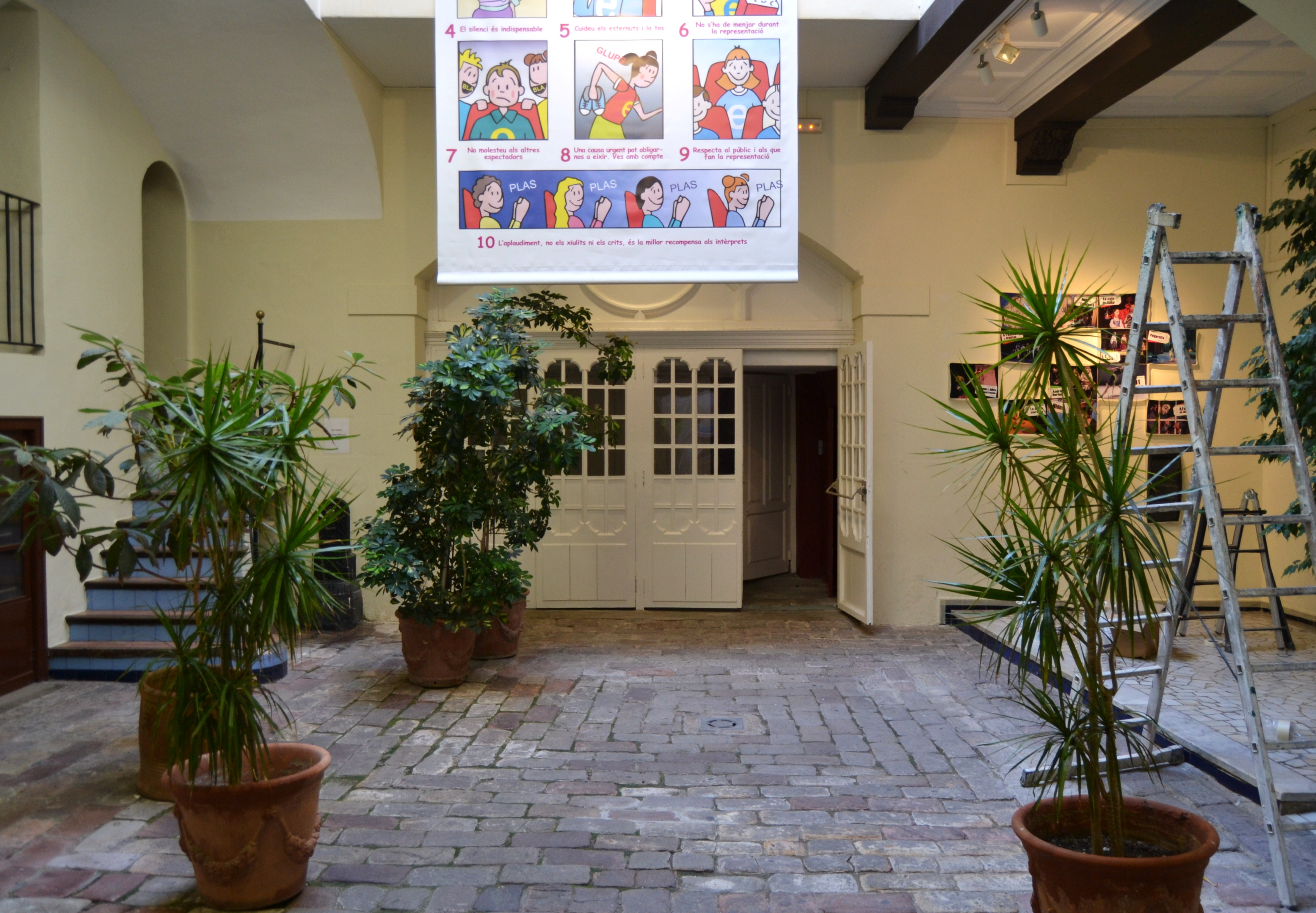 Pati del teatre Escalante de València, antiga casa procura del monestir de la Valldigna.